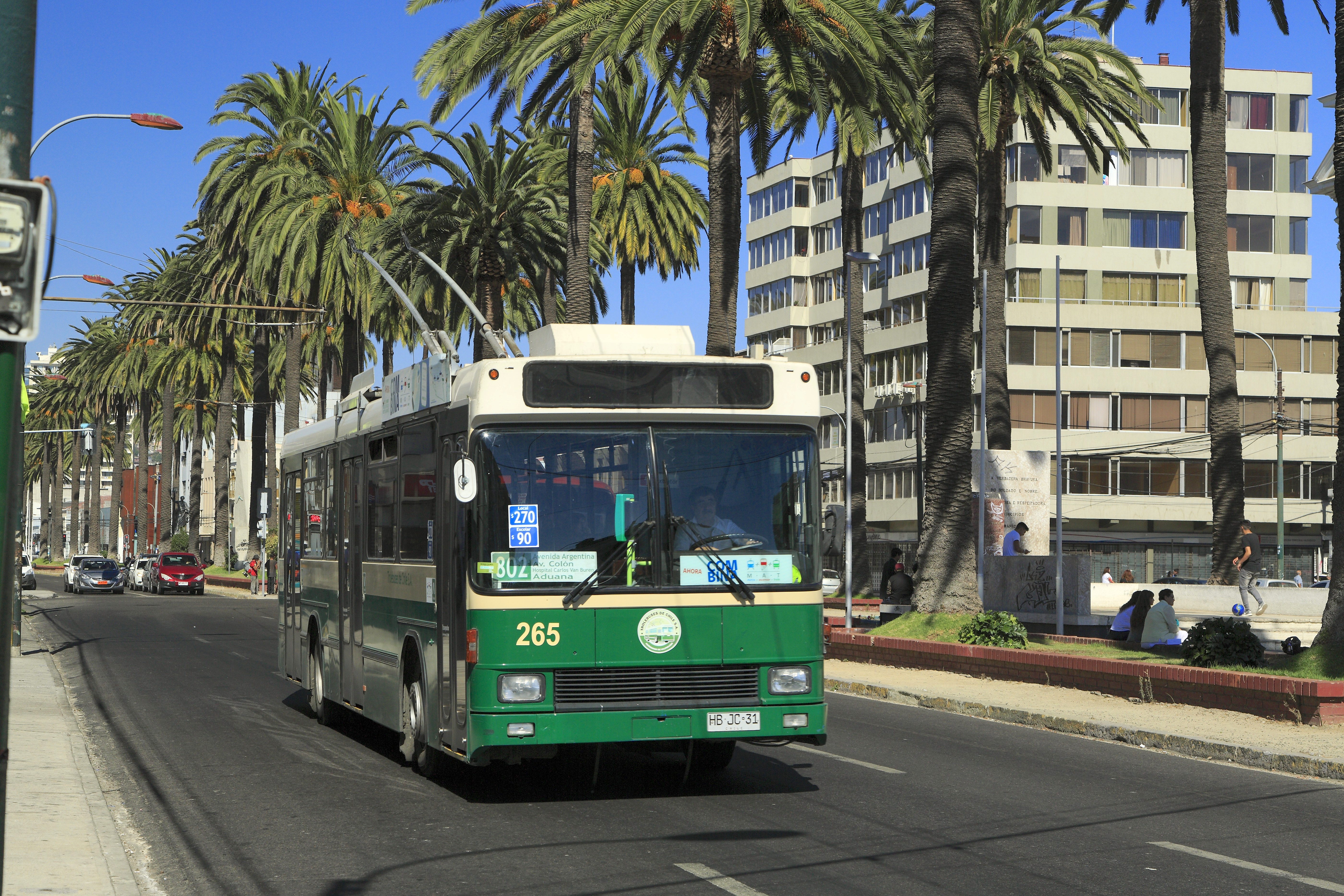 Einer der aus Luzern übernommenen Obusse, sie fallen durch ihre noch immer modern wirkende Kastenform und den guten Zustand auf. Der Lack glänzt, offenbar sind die Wagen hier noch nicht lange im Einsatz.Der Wagen 265 ist bei der Fahrt in Richtung Plaza Aduana aus der calle Edwards in die Avenida Brasil eingebogen.